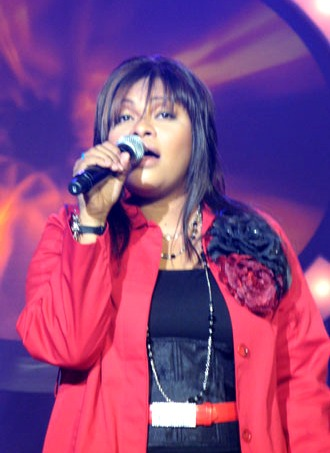 Tagalog: Kinarga ni Wikipedian "Idolseries08" sa Wikipedia Inggles. Pag-aari niya ang larawan at inilabas sa "public domain".